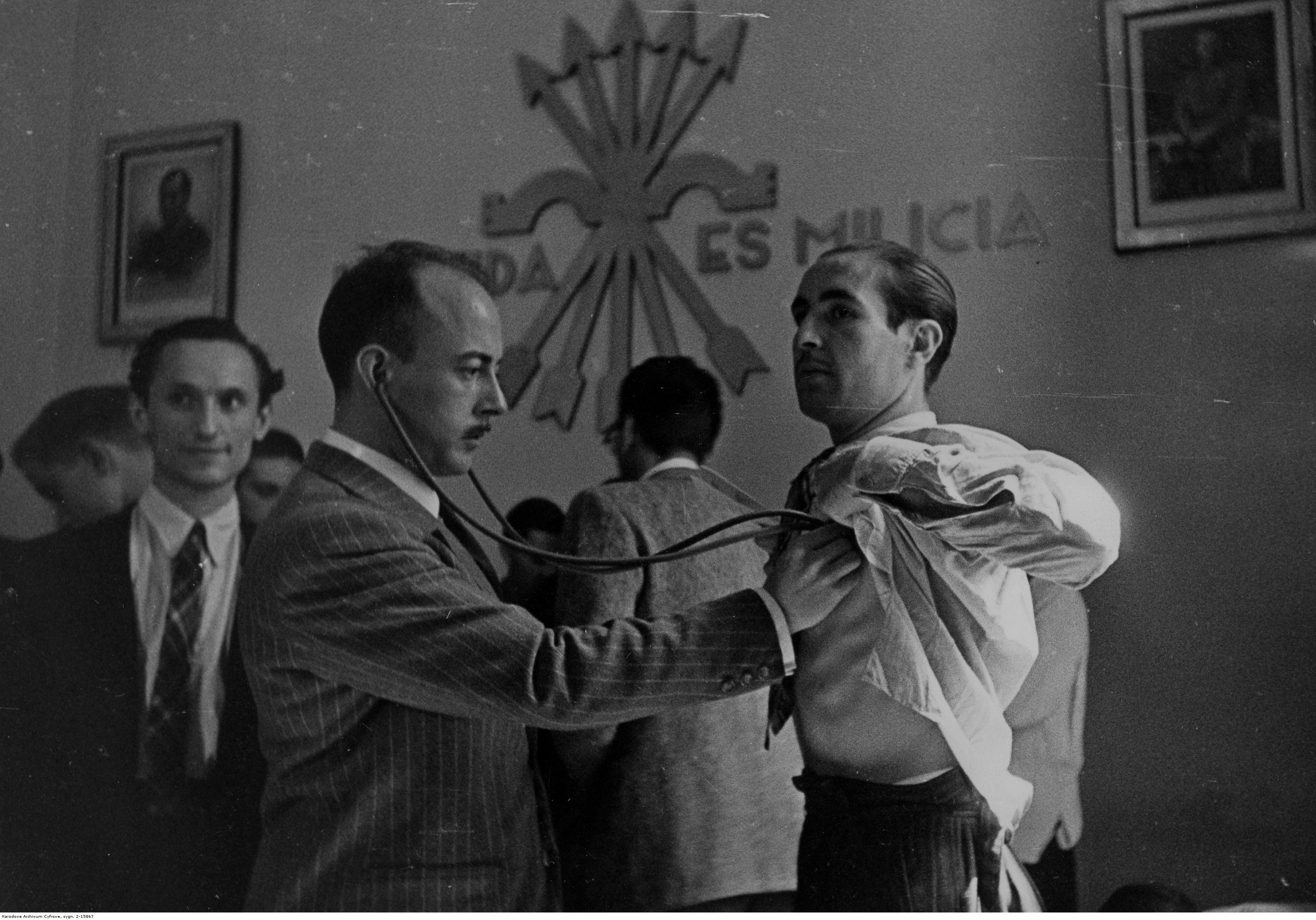 El médico examina a los voluntarios para la División Azul.